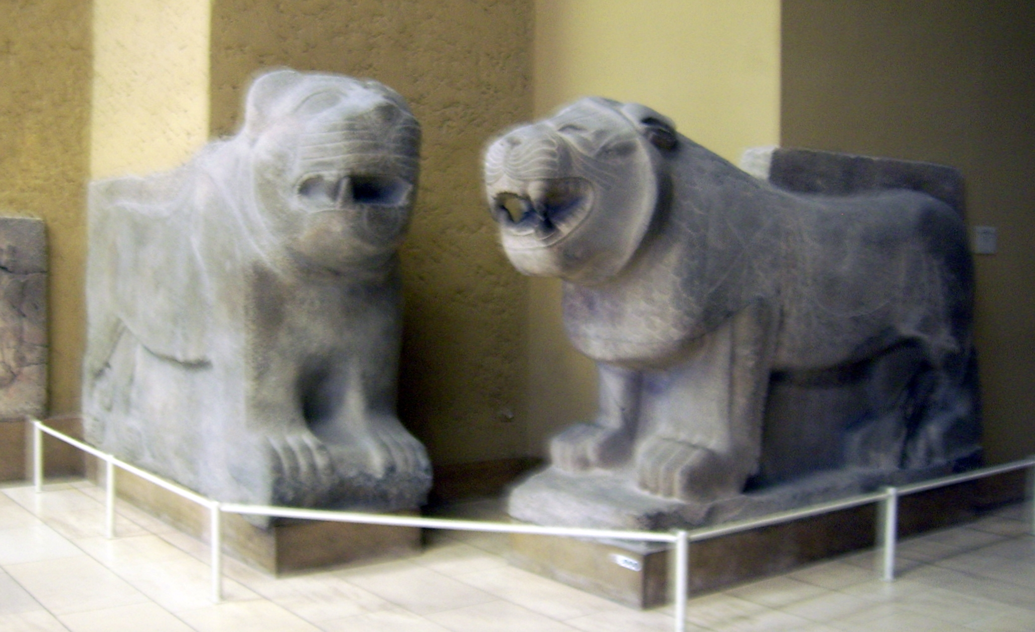 Torlöwen aus Sam'al, Vorderasiatisches Museum Berlin, 10./8. Jahrhundert v. Chr., VAG 1042, VA 2719, VA 2718 und VA 3001